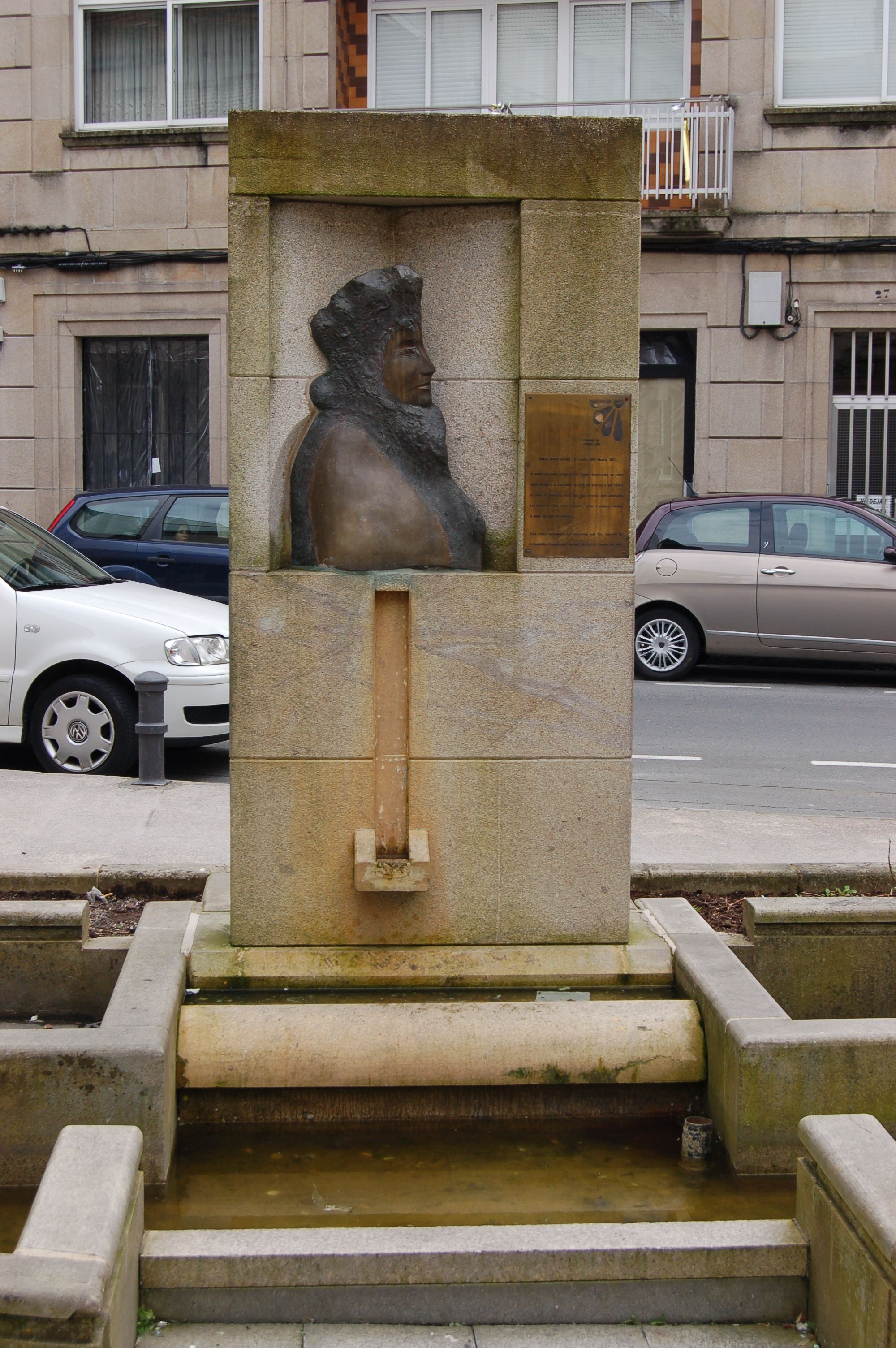 Estatua de homenaxe a Emilia Pardo Bazán no Carballiño.